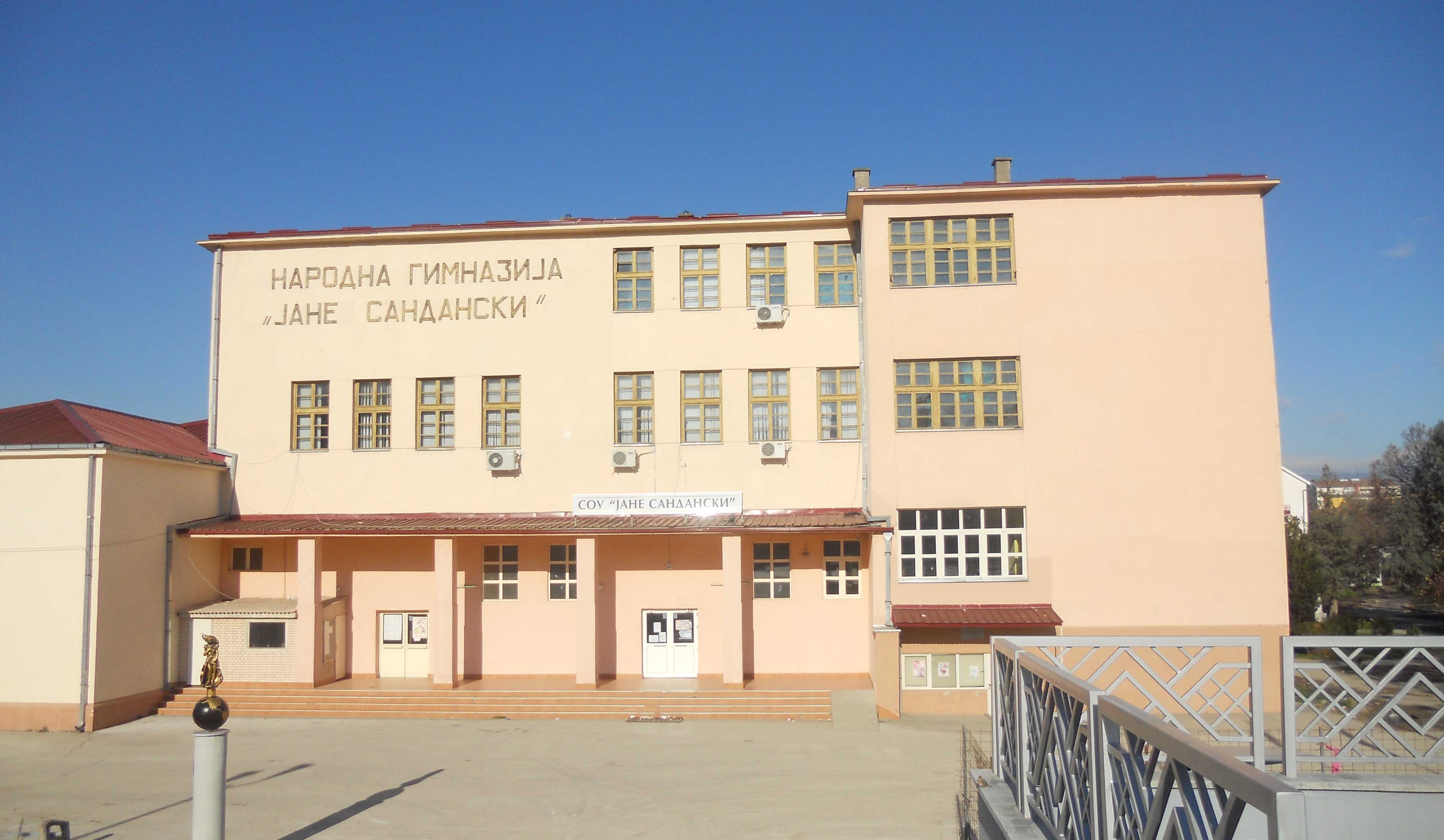 СУ "Јане Сандански" - Струмица